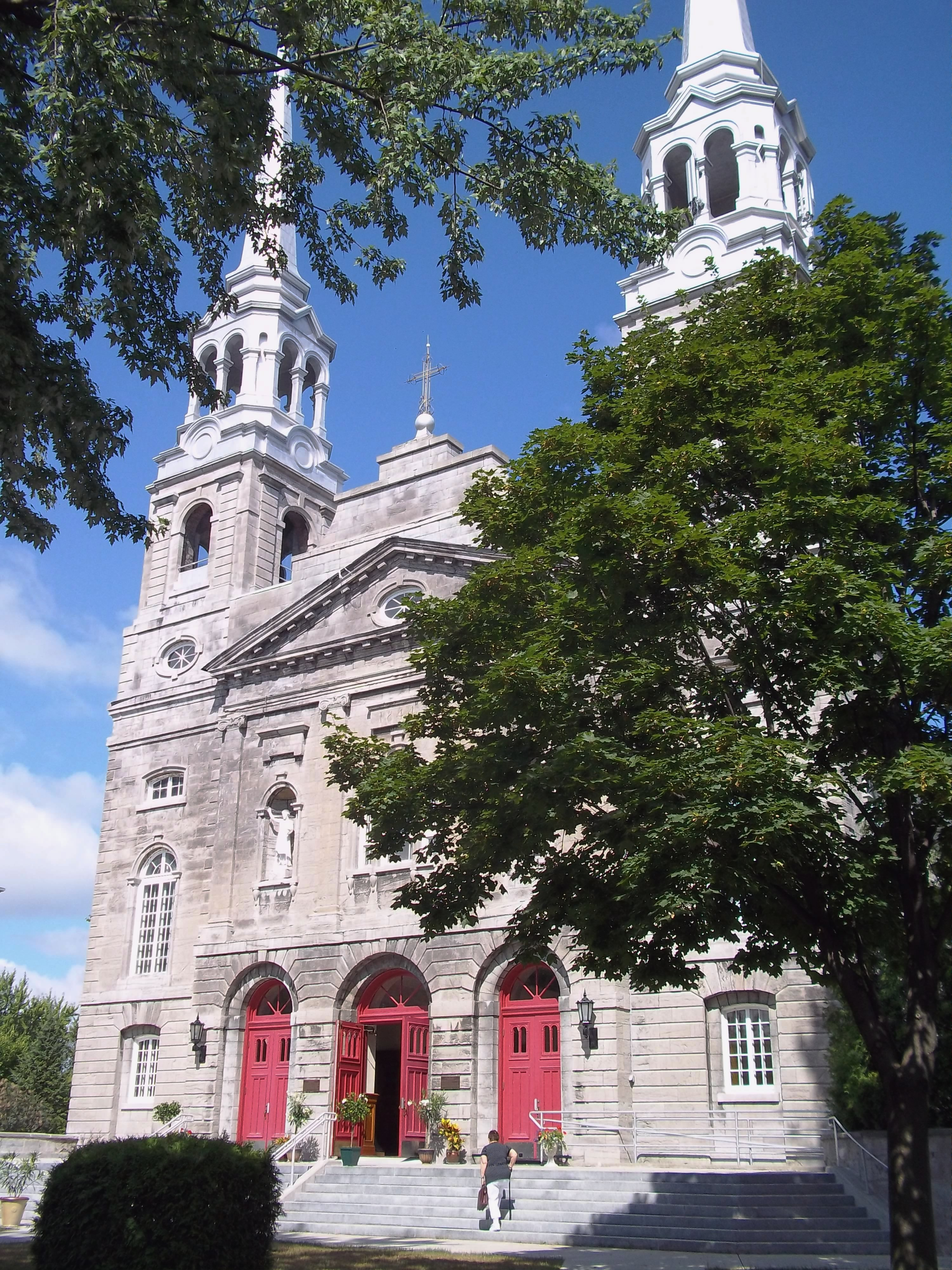 Église Sainte-Geneviève de Montréal, 16 037 boulevard Gouin ouest, Montréal (info)